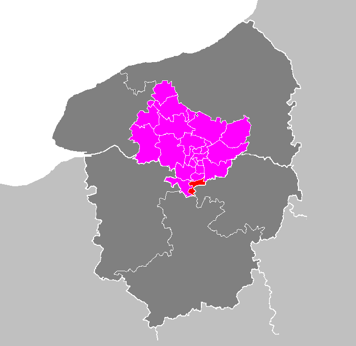 Maps of arrondissements and cantons of France: Arrondissement de Rouen - Canton de Caudebec-lès-Elbeuf.PNG